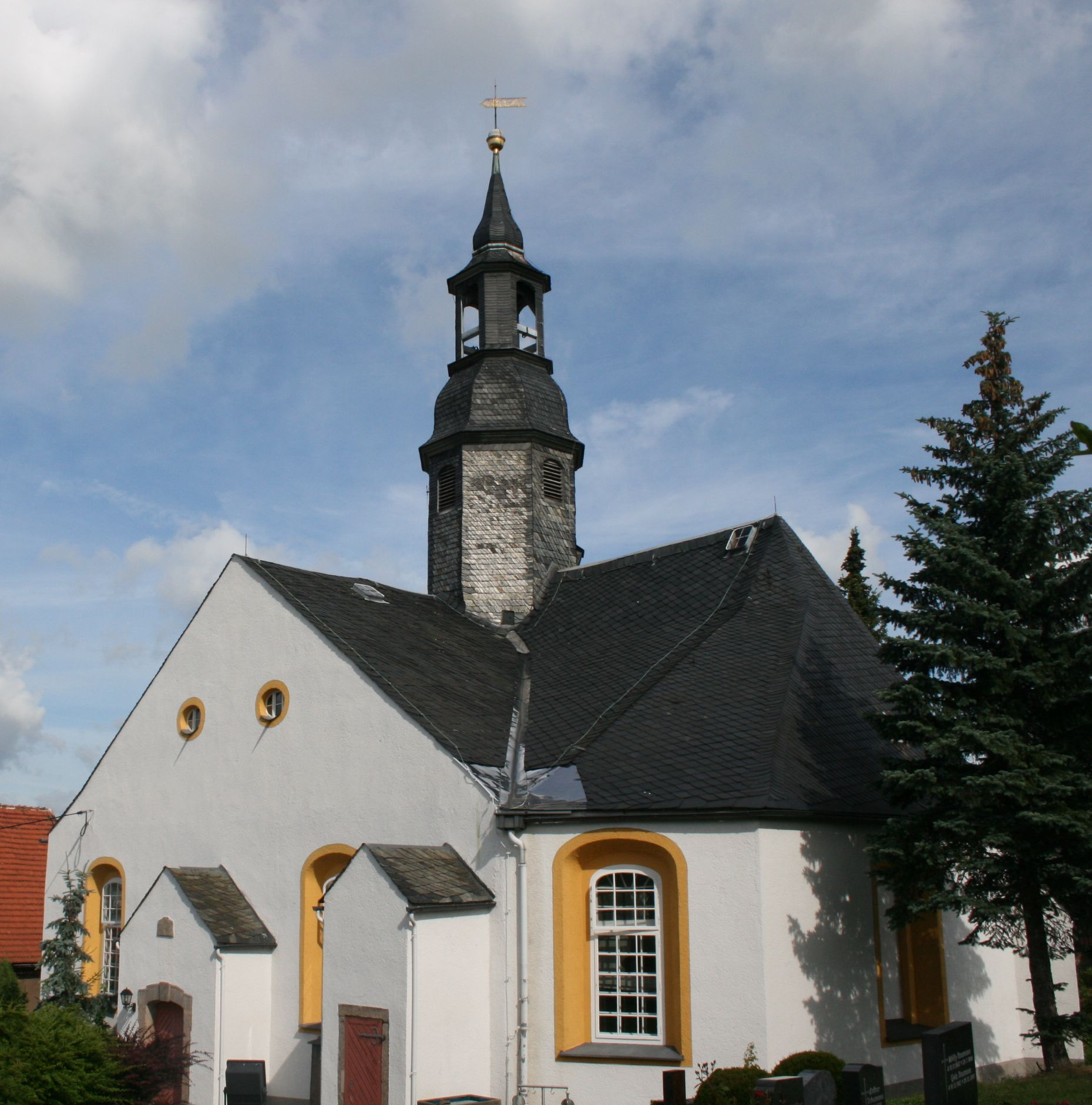 Die Johannes dem Täufer geweihte spätgotische Kirche wurde schon im Jahr 1500 erwähnt. Großer dachhoher Anbau nach Süden aus dem Jahr 1750.